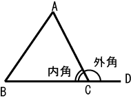 三角形の内角と外角。オリジナル。放棄可能な著作権をすべて放棄したPDとして利用可能です。